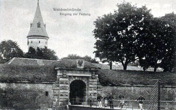 Gdańsk Wisłoujście - twierdza.